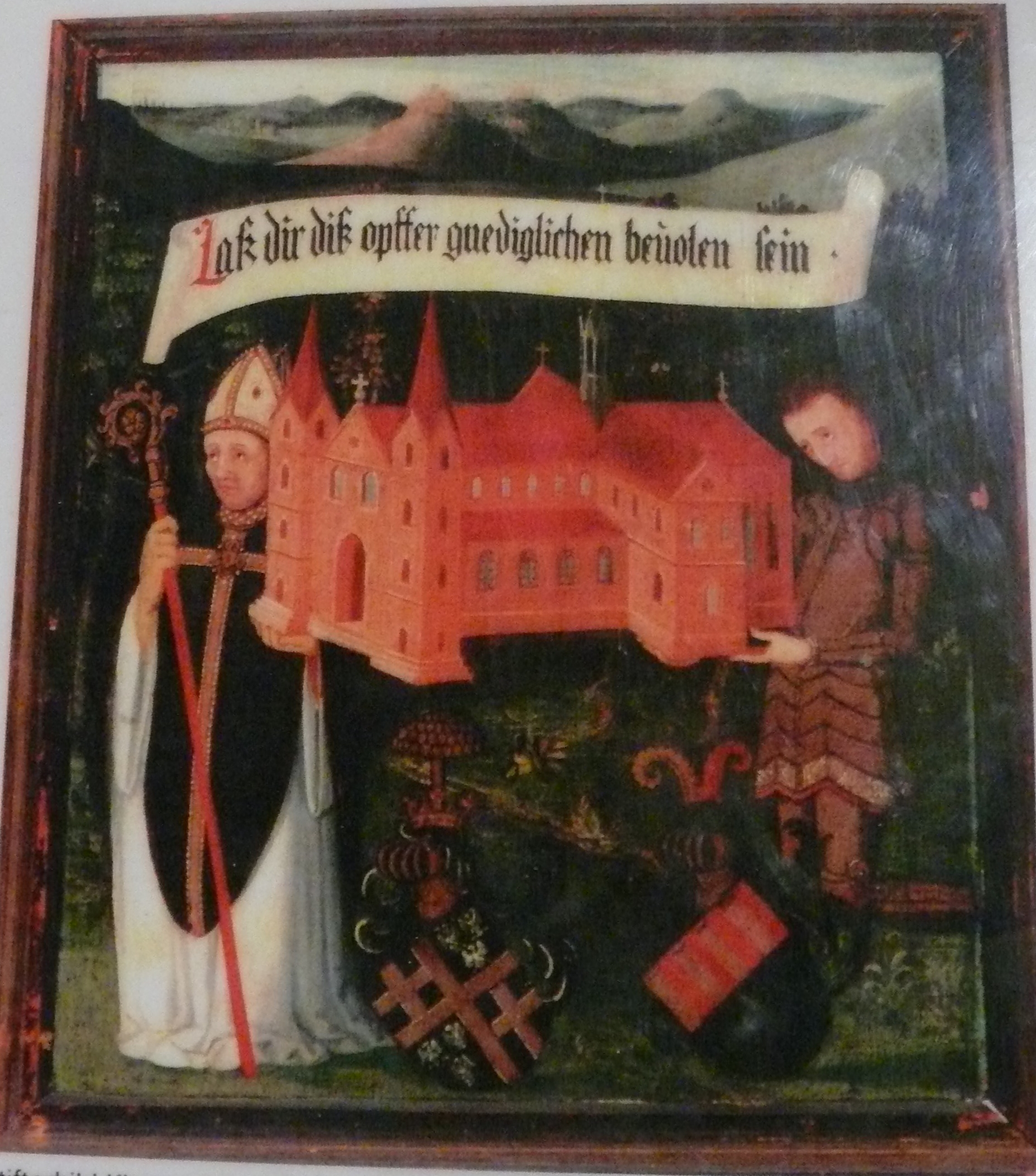 Maulbronn